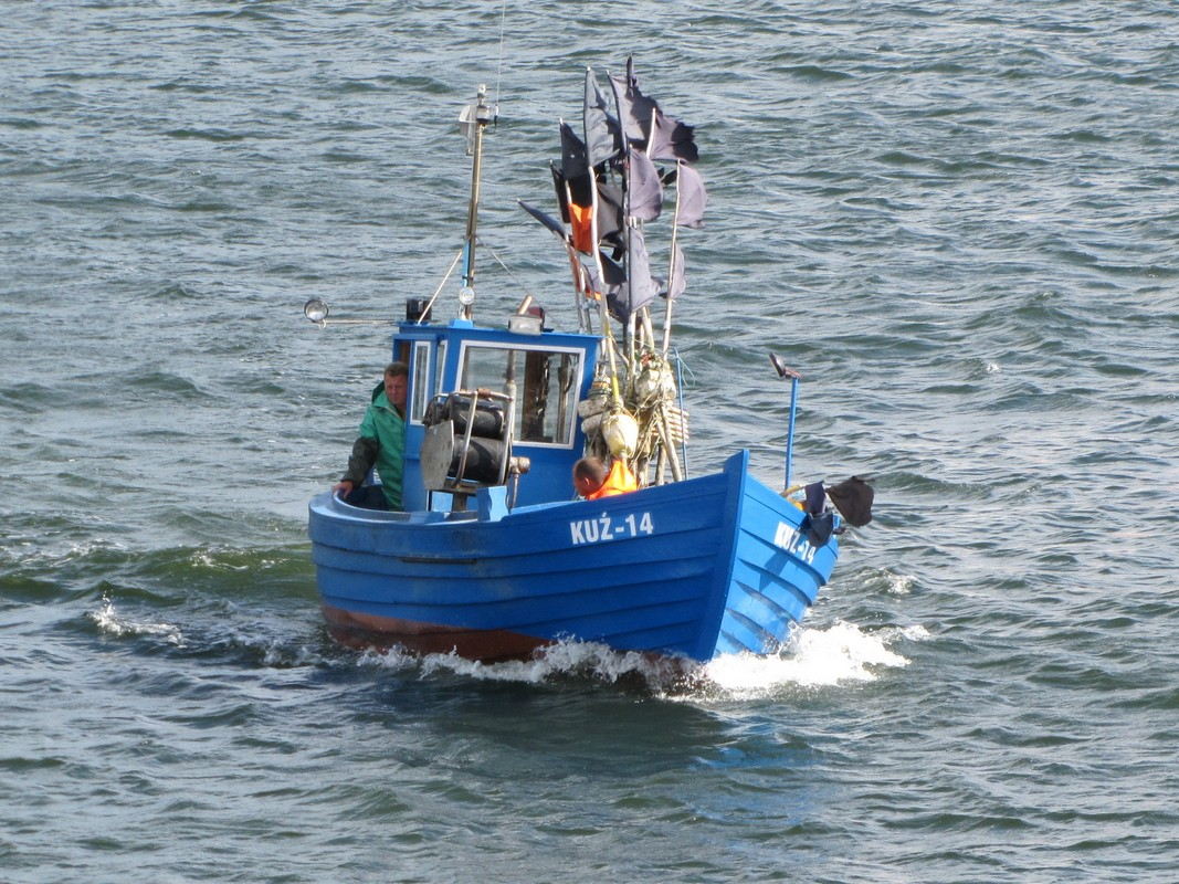 KUTER RYBACKI NA ZATOCE.